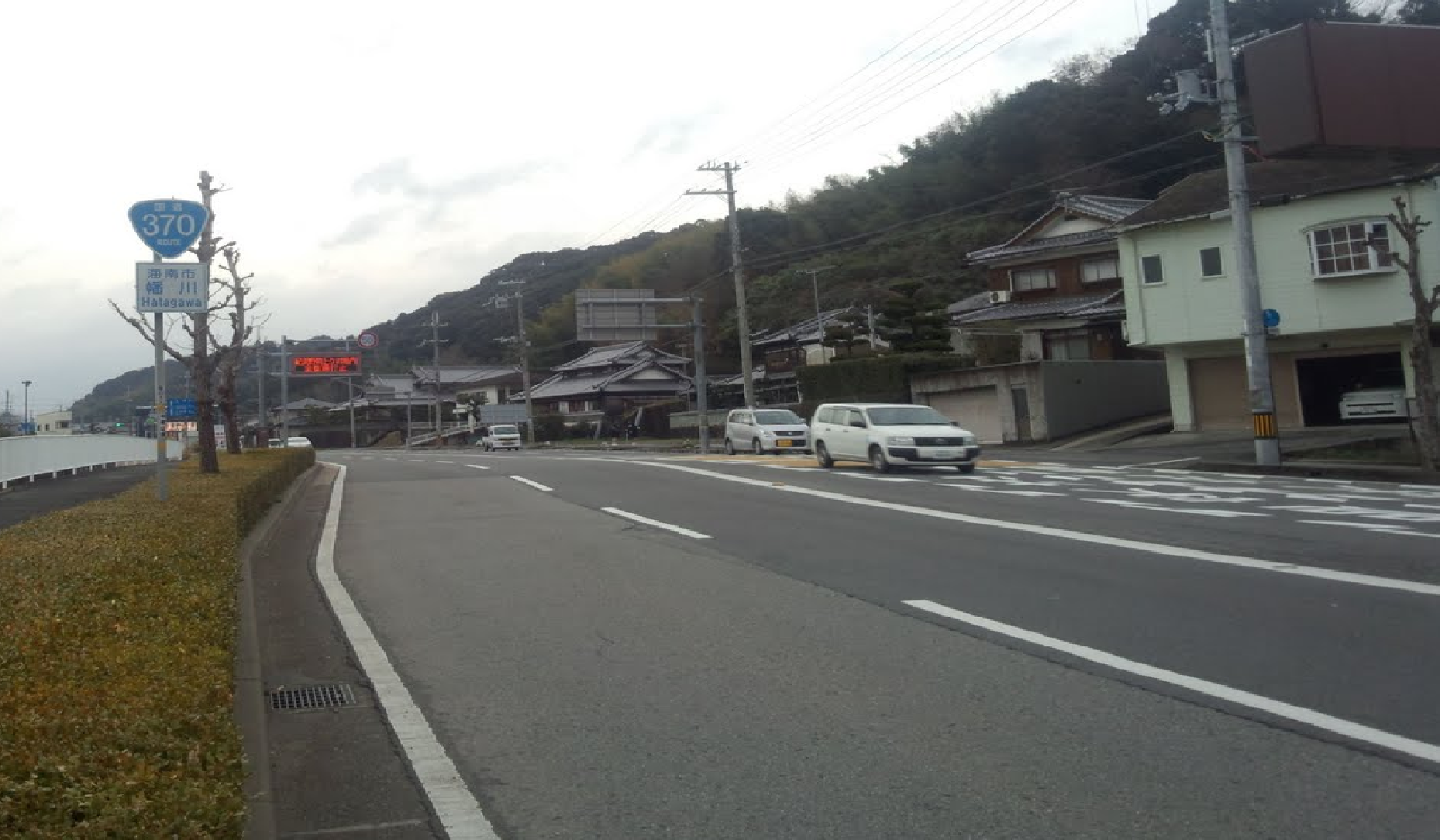 国道370号線。